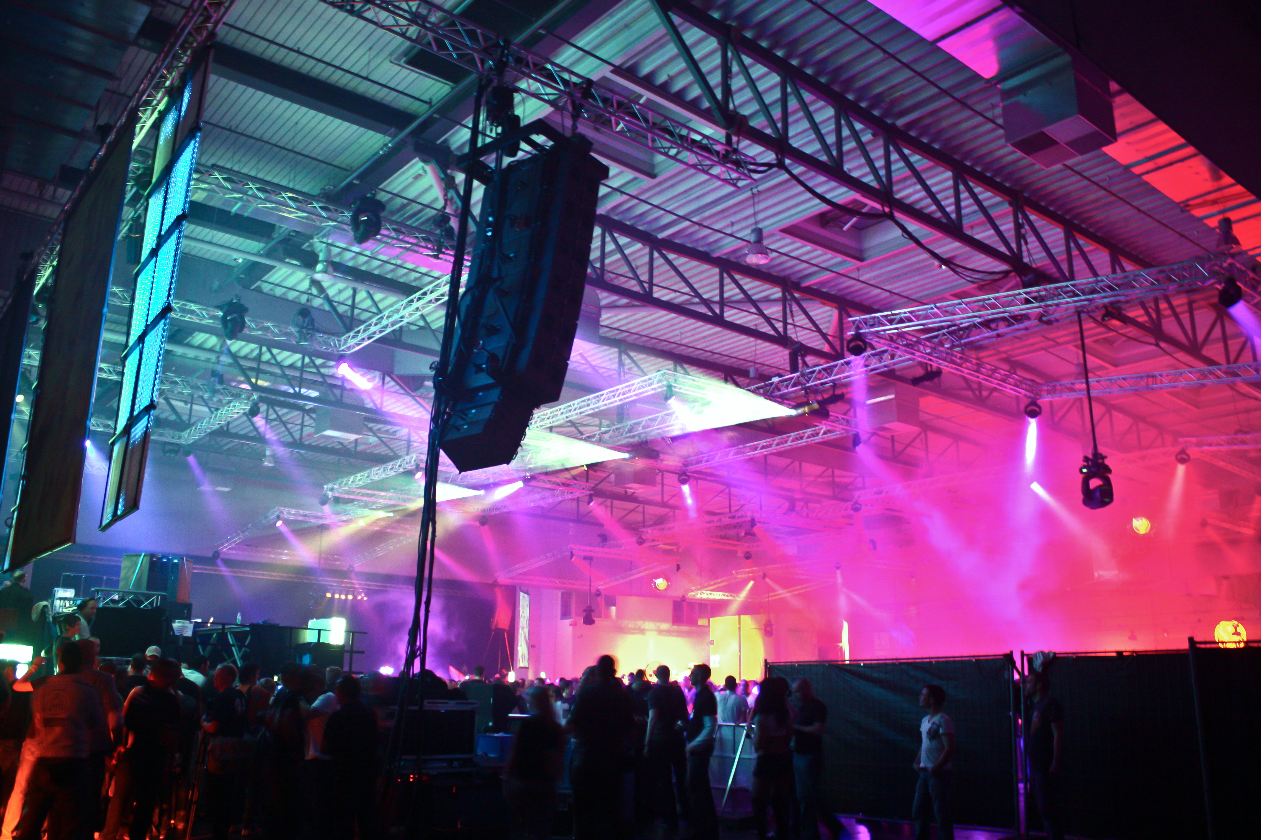 Halle 2 der Mayday 2009 in Dortmund